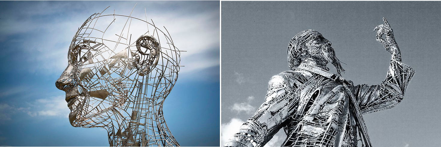 Celia & Cerdà - Jordi Díez